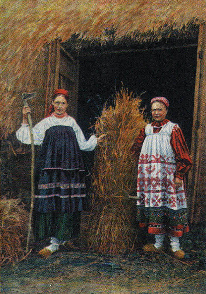 Последний сноп. Фото. Начало ХХ в.